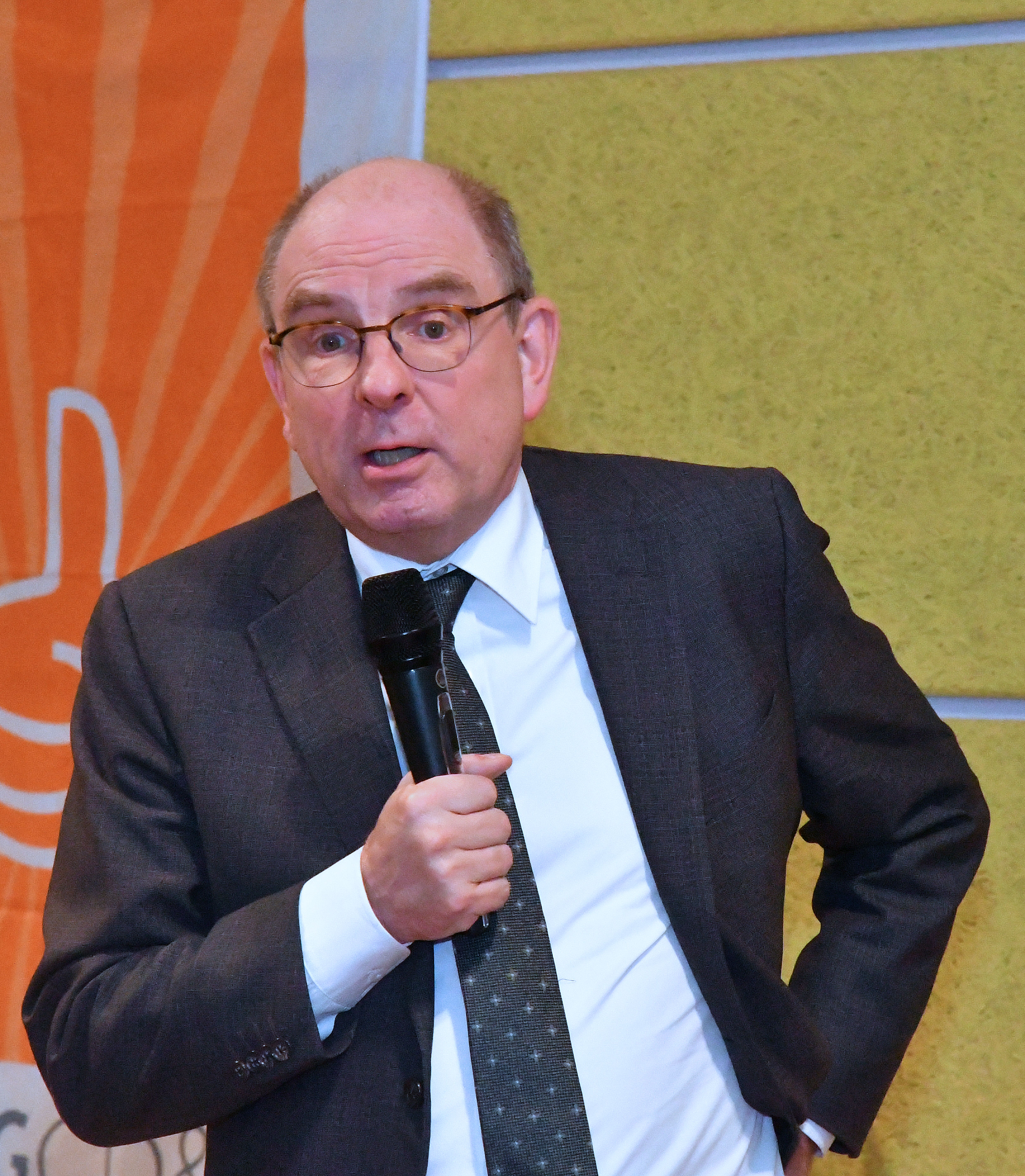 Justitieminister Koen Geens tijdens een toespraak op een nieuwjaarsreceptie in Zemst